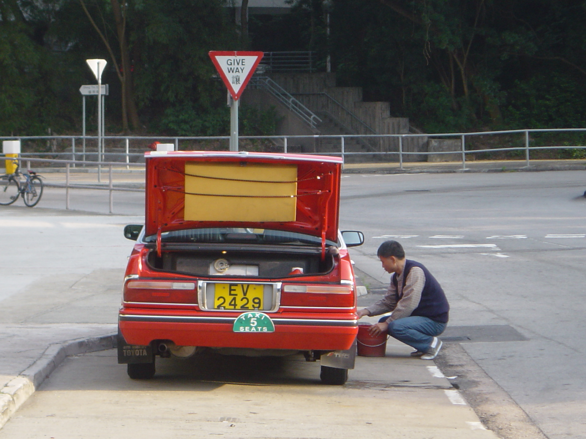 一架清潔中的香港的士。A cleaning taxi, Hong Kong.